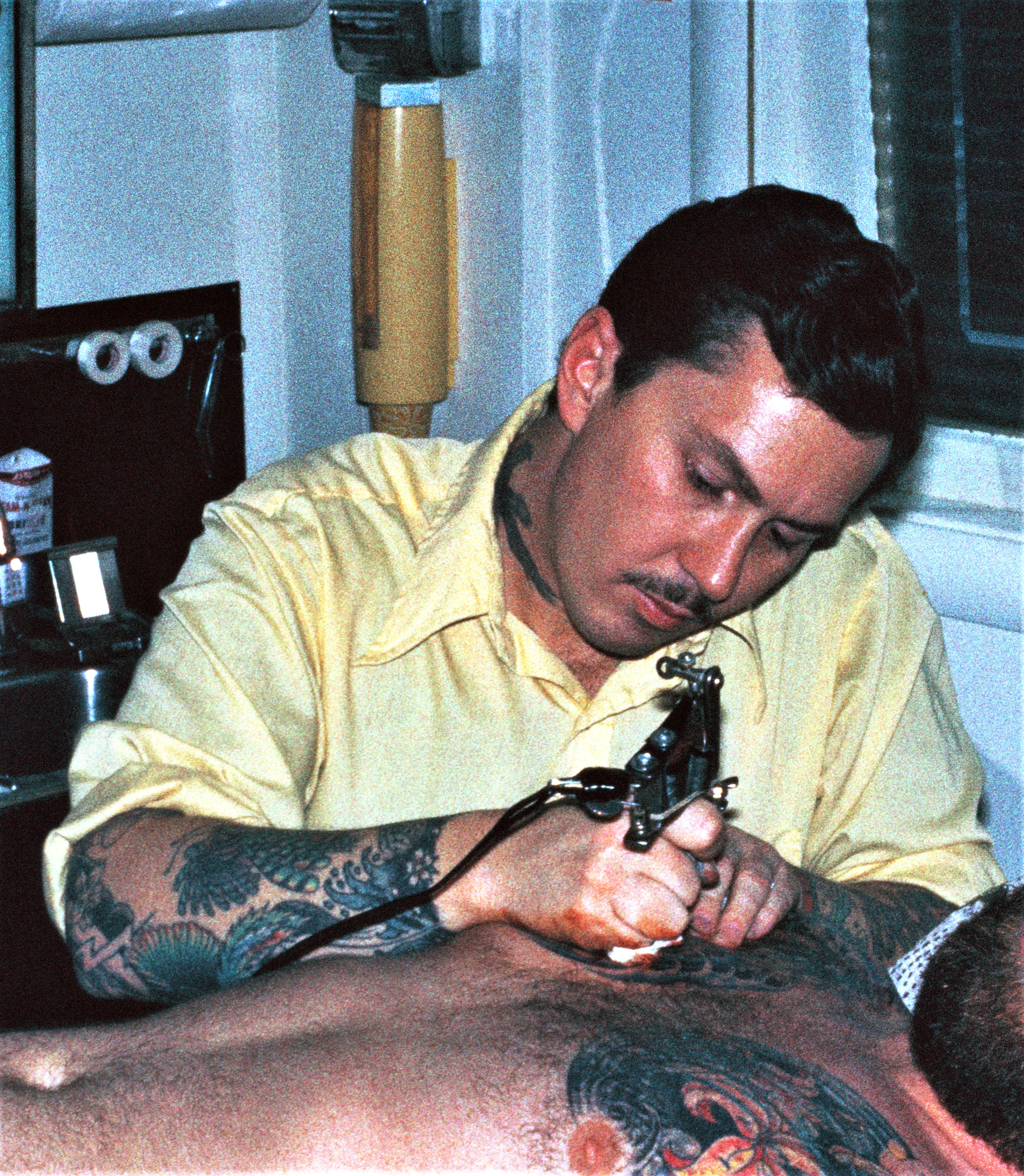 Don Ed Hardy 1980 auf der 5. Tattoo Convention des North American Tattoo Club in Sacramento Cal.